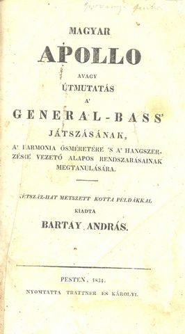 Bartay Endre Magyar Apollo című zeneelméleti művének borítója